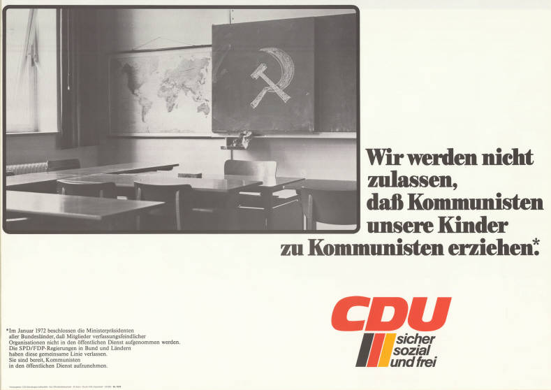 Wir werden nicht zulassen, daß Kommunisten unsere Kinder zu Kommunisten erziehen.* CDU sicher sozial und frei *Im Januar 1972 beschlossen die Ministerpräsidenten aller Bundesländer, daß Mitglieder verfassungsfeindlicher Organisationen nicht in den öffentlichen Dienst aufgenommen werden. Die SPD/FDP-Regierungen in Bund und Ländern haben diese gemeinsame Linie verlassen. Sie sind bereit, Kommunisten in den öffentlichen Dienst aufzunehmen. Abbildung: Klassenzimmer mit Kreidezeichnung "Hammer und Sichel" an Schultafel (Foto) Plakatart: Motiv-/Textplakat Auftraggeber: CDU-Bundesgeschäftsstelle, Abt. Öffentlichkeitsarbeit, Bonn Drucker_Druckart_Druckort: VVA, Düsseldorf Objekt-Signatur: 10-025 : 81 Bestand: Wandzeitungen (10-025) GliederungBestand10-18: CDU-Bundesgeschäftsstelle Lizenz: KAS/ACDP 10-025 : 81 CC-BY-SA 3.0 DE